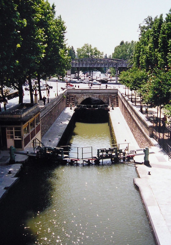 Canal Saint-Martin écluse